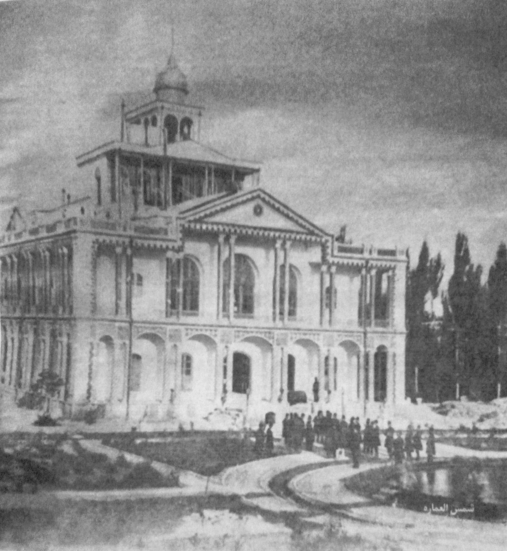 شمس‌العماره تبریز، استانداری امروز